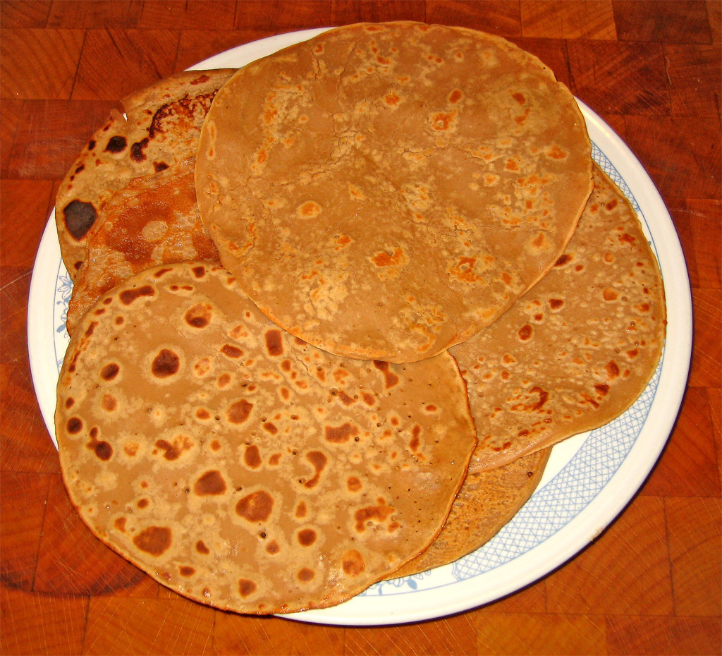 Necci di farina di castagne - Toscana, Italia.